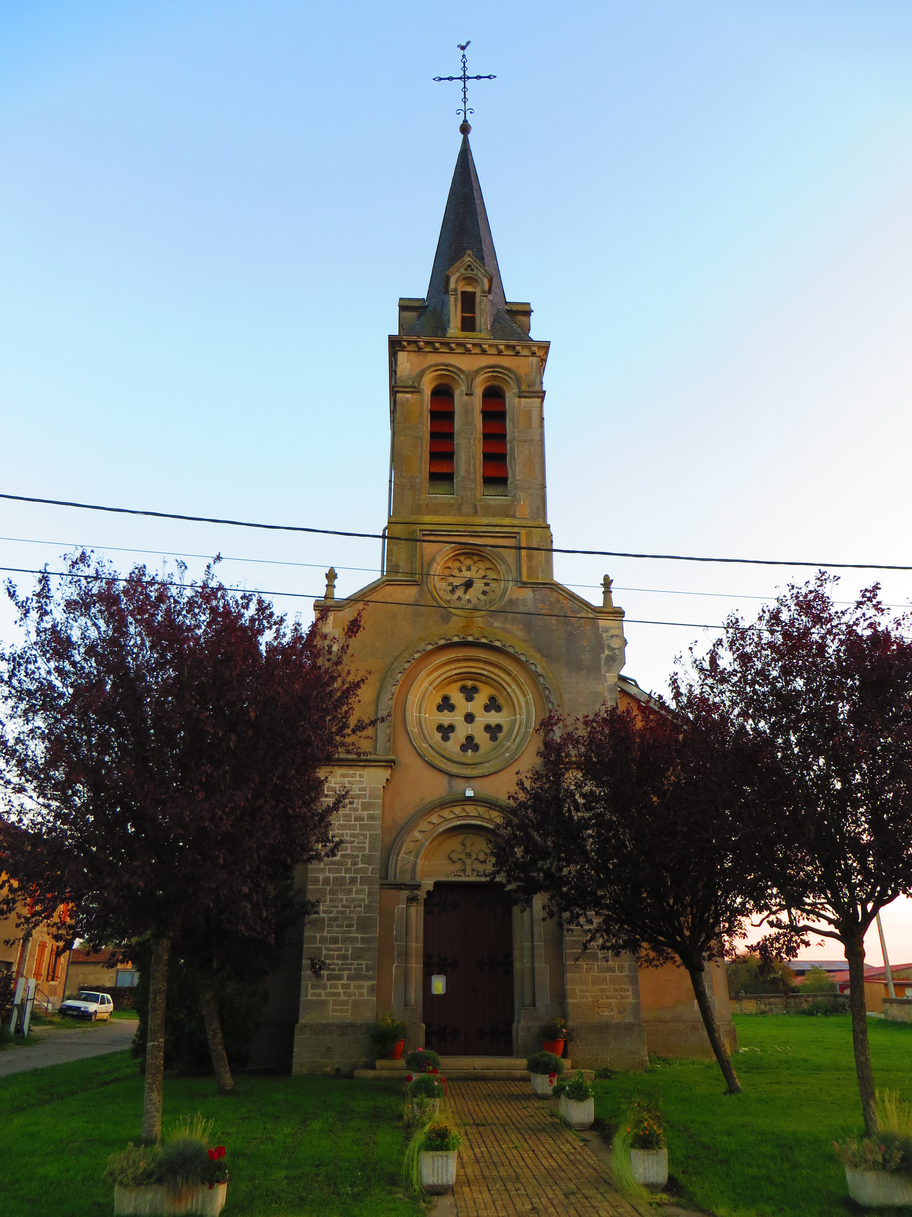 Frémery l'église Saint-Jean-Baptiste